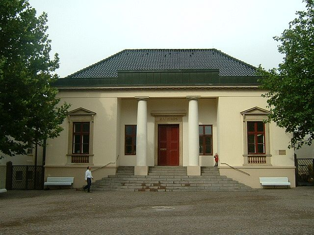 Neustadt in Schleswig Holstein, Marktplatz mit Rathaus (City hall)